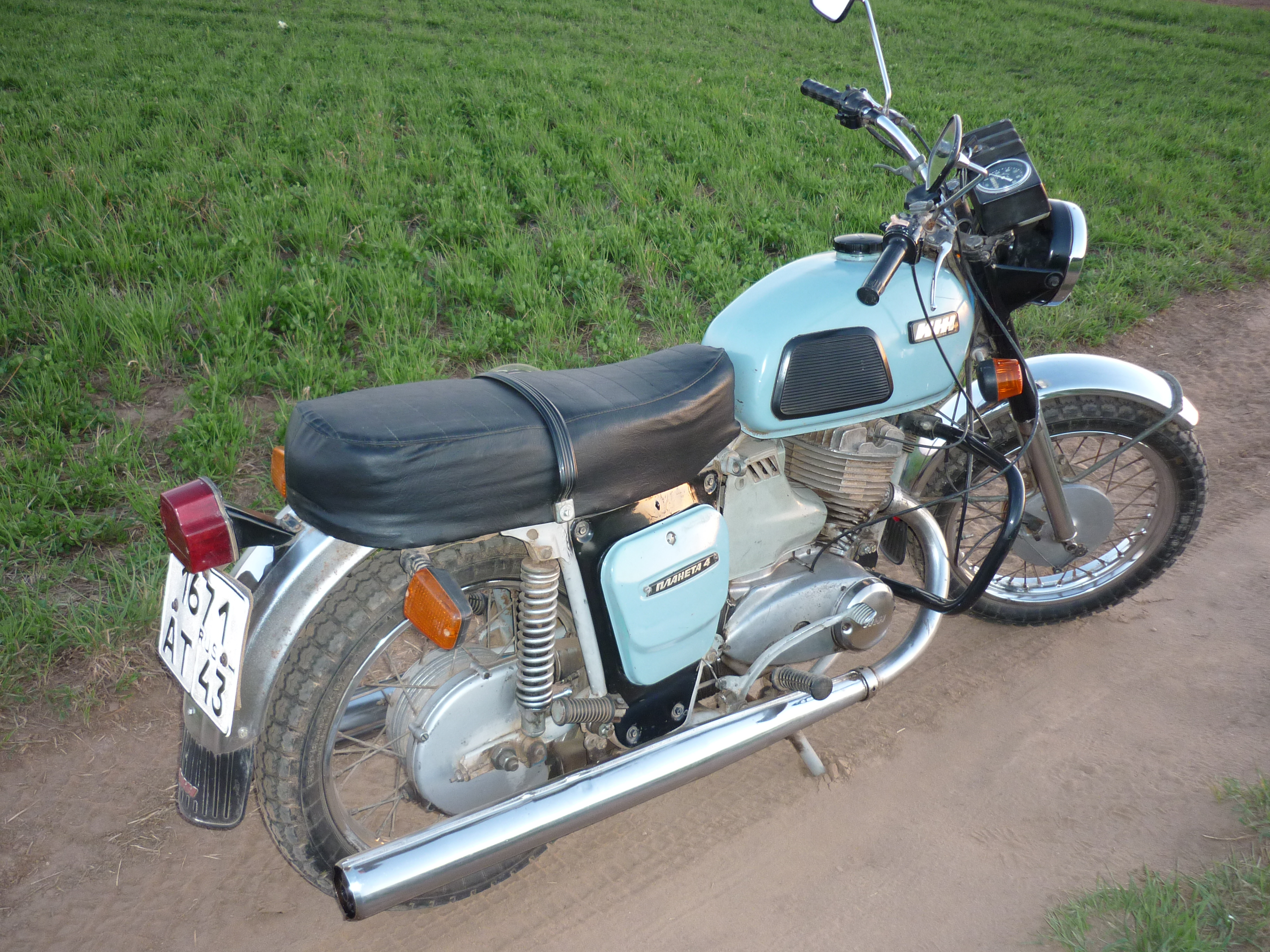 1984год